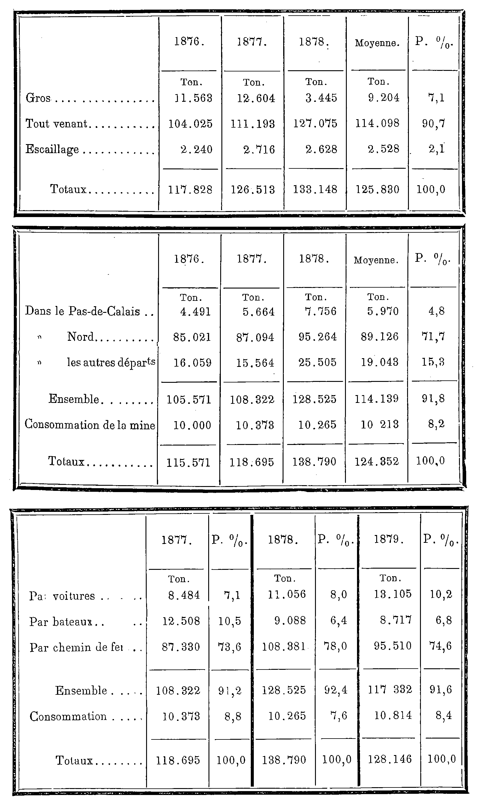 Renseignements sur les ventes de la Compagnie des mines de Carvin de 1876 à 1878.